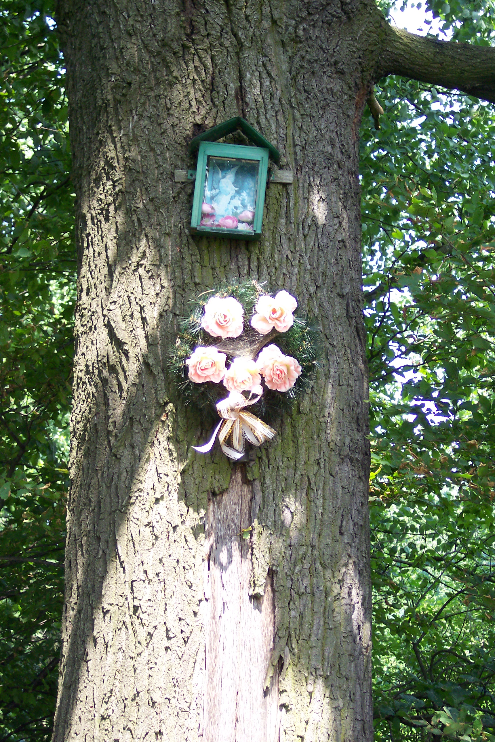 Przydrożny symbol religijny w Bąkach (woj. opolskie)